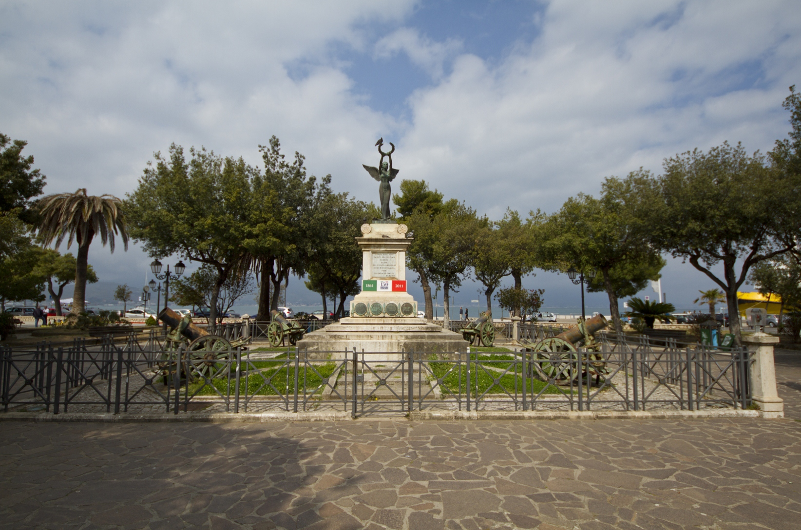 Monumento ai Caduti